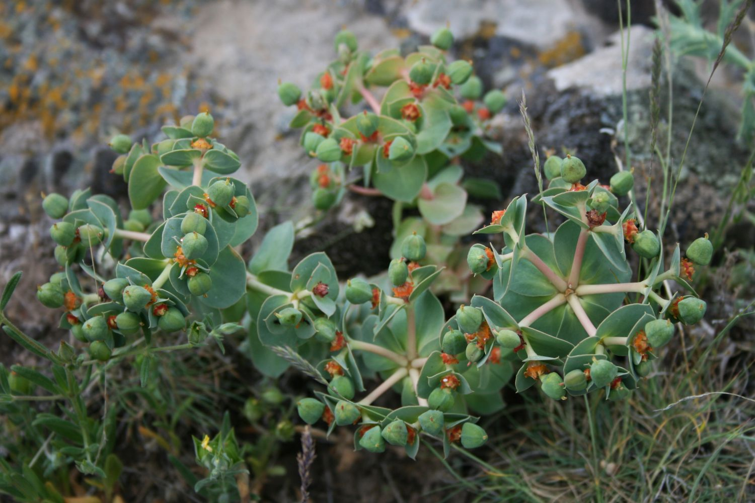 Euphorbia anacampseros var. anacampseros, Wolfsmilchgewächse (Euphorbiaceae) - Türkei/Türkiye/Turkey: Prov. Bolu/Bolu ili, Köroğlu Dağları, an der Straße ca. 4,5 km WNW Karaköy, WNW Kıbrıscık, ca. 1250 m s.m.